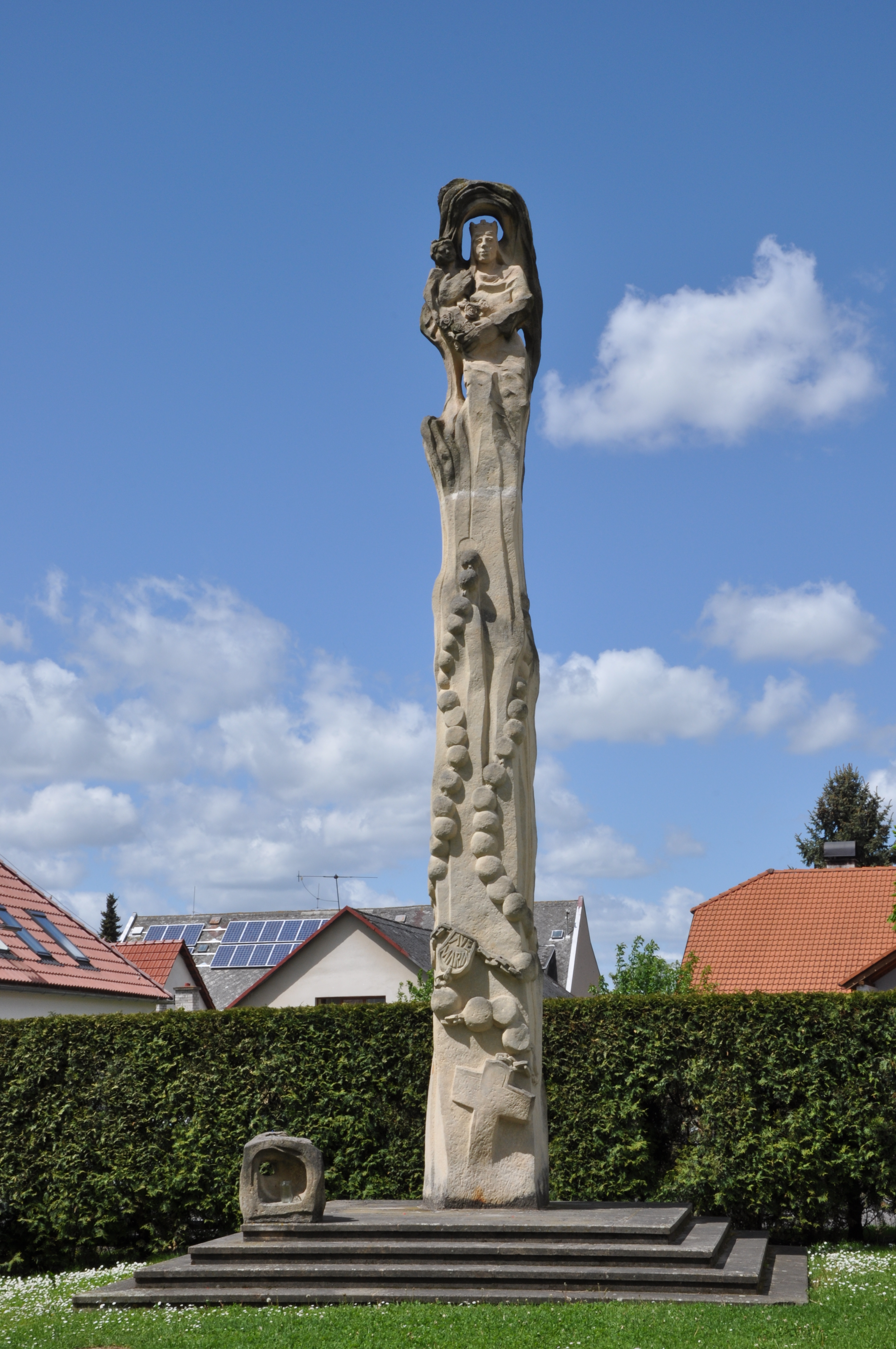 Mariánský sloup - v roce 1998 zhotovil akademický sochař a rodák z Přibyslavi Roman Podrázský (autor obrazů, plastik a soch). Kostelní 265. Město Přibyslav. Okr. Havlíčkův Brod. Kraj Vysočina. Czech Republik.